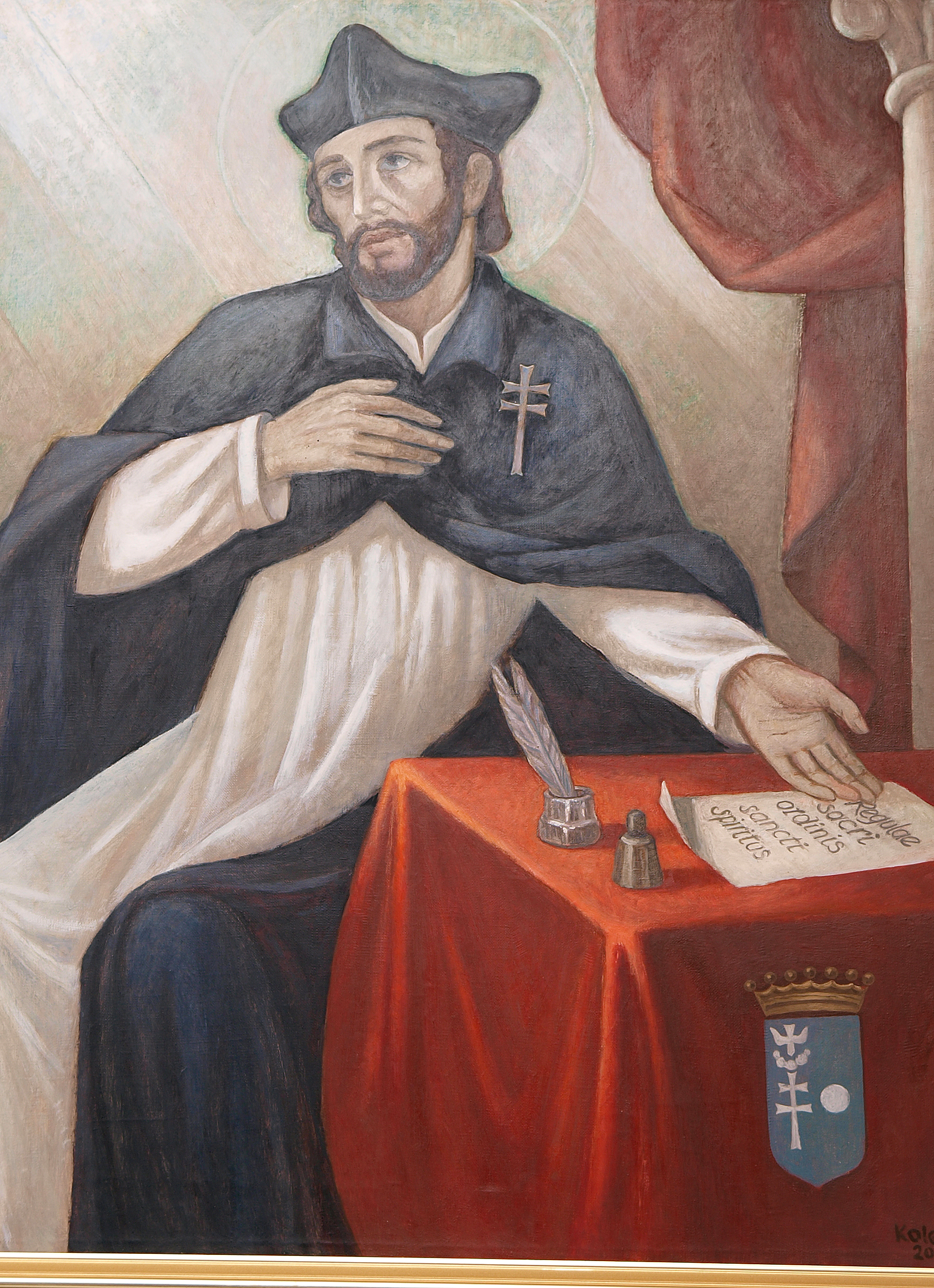 bł. Ojciec Gwidon z Montpellier